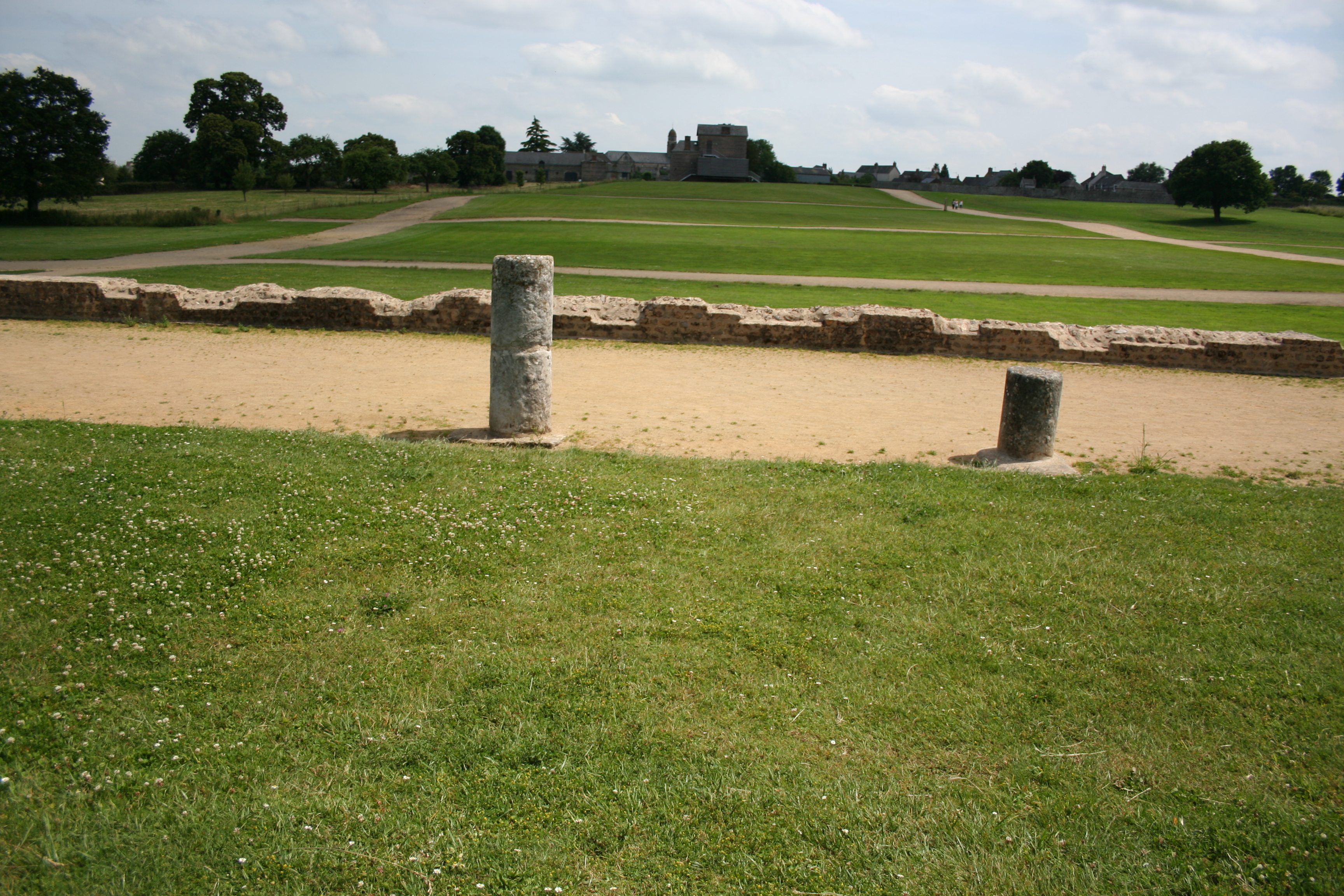 Vue des quartiers d'habitation matérialisés au sol dans le site de Jublains : la vue est prise du sanctuaire et on voit la maison de la tonnelle, bâtie à l'emplacement du forum